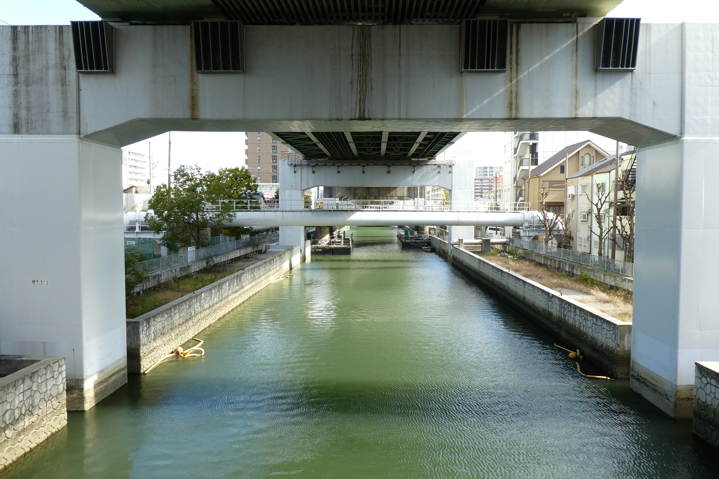 赤川橋から東向きに撮影した城北川（旧、城北運河） 上は阪神高速12号守口線